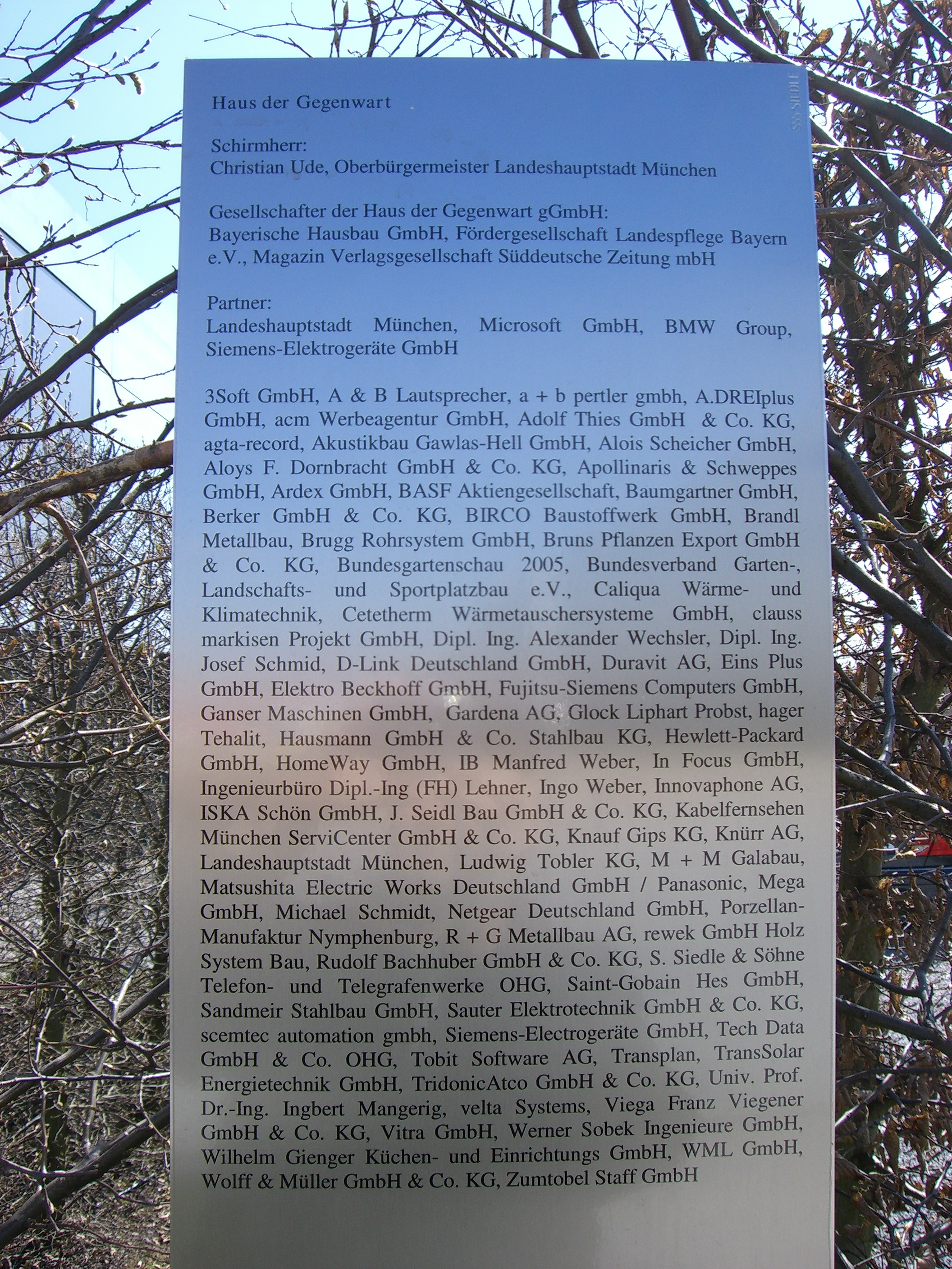 München: Haus der Gegenwart (Schild)